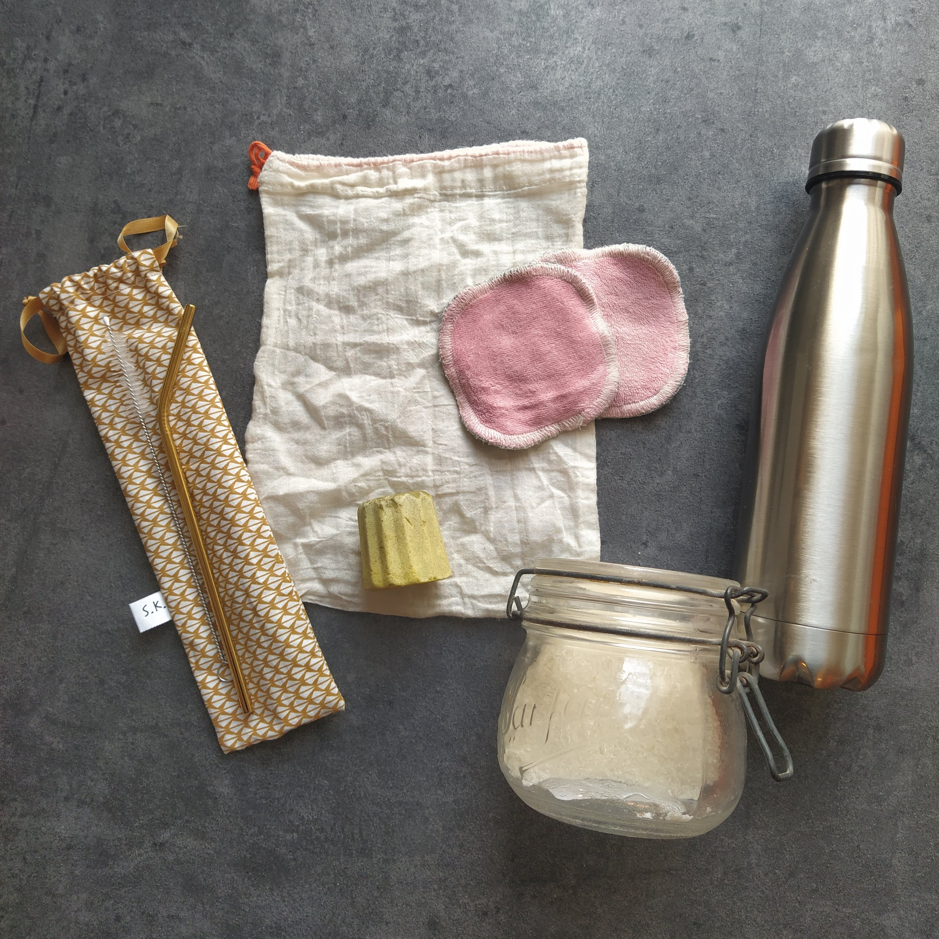 Paille en inox, sac à vrac, shampoing solide, cotons lavables, gourde en inox et bocal en verre.